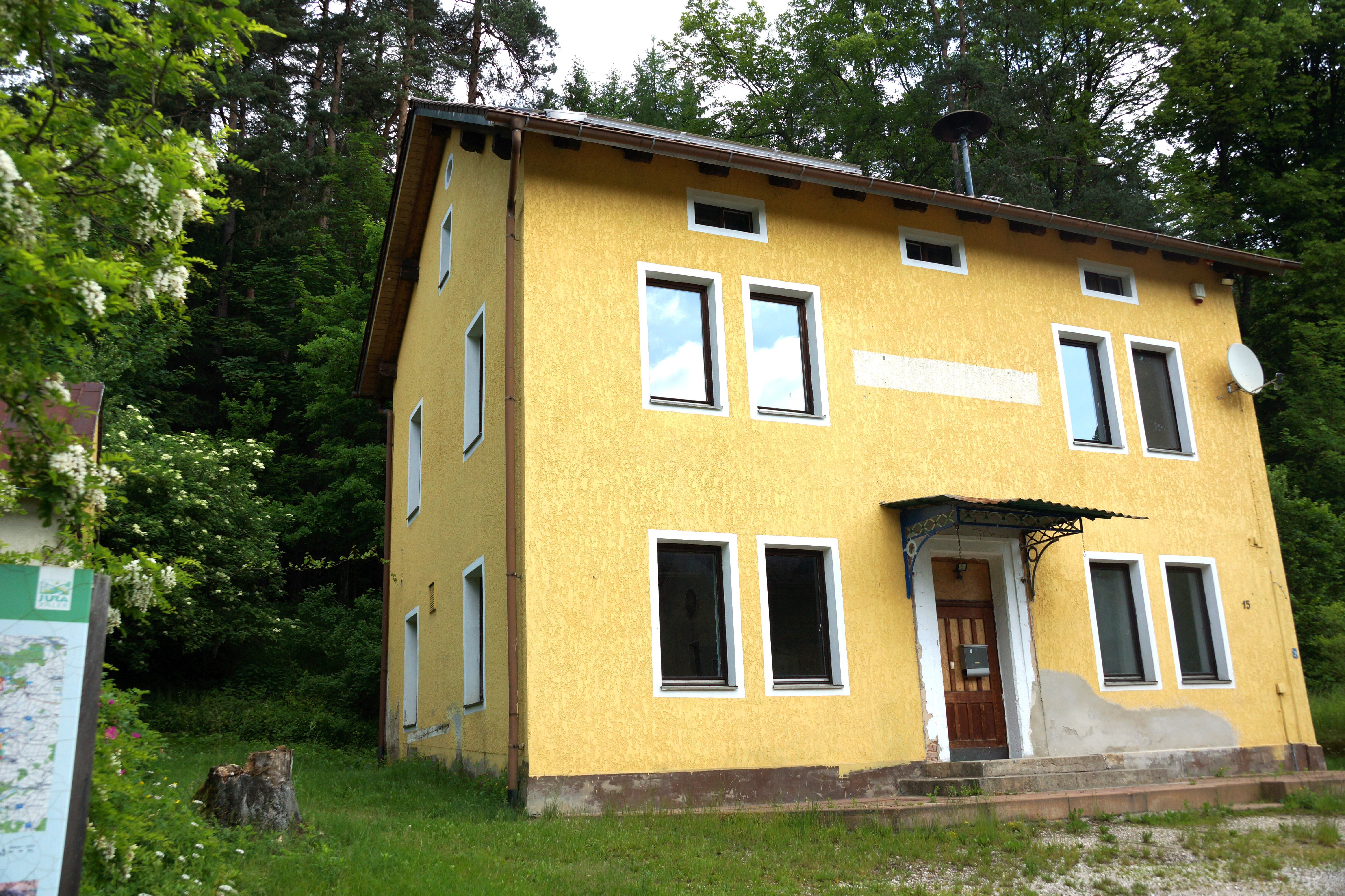 Deinininger Bahnhof: Ehemalige Bahnhofsgaststätte